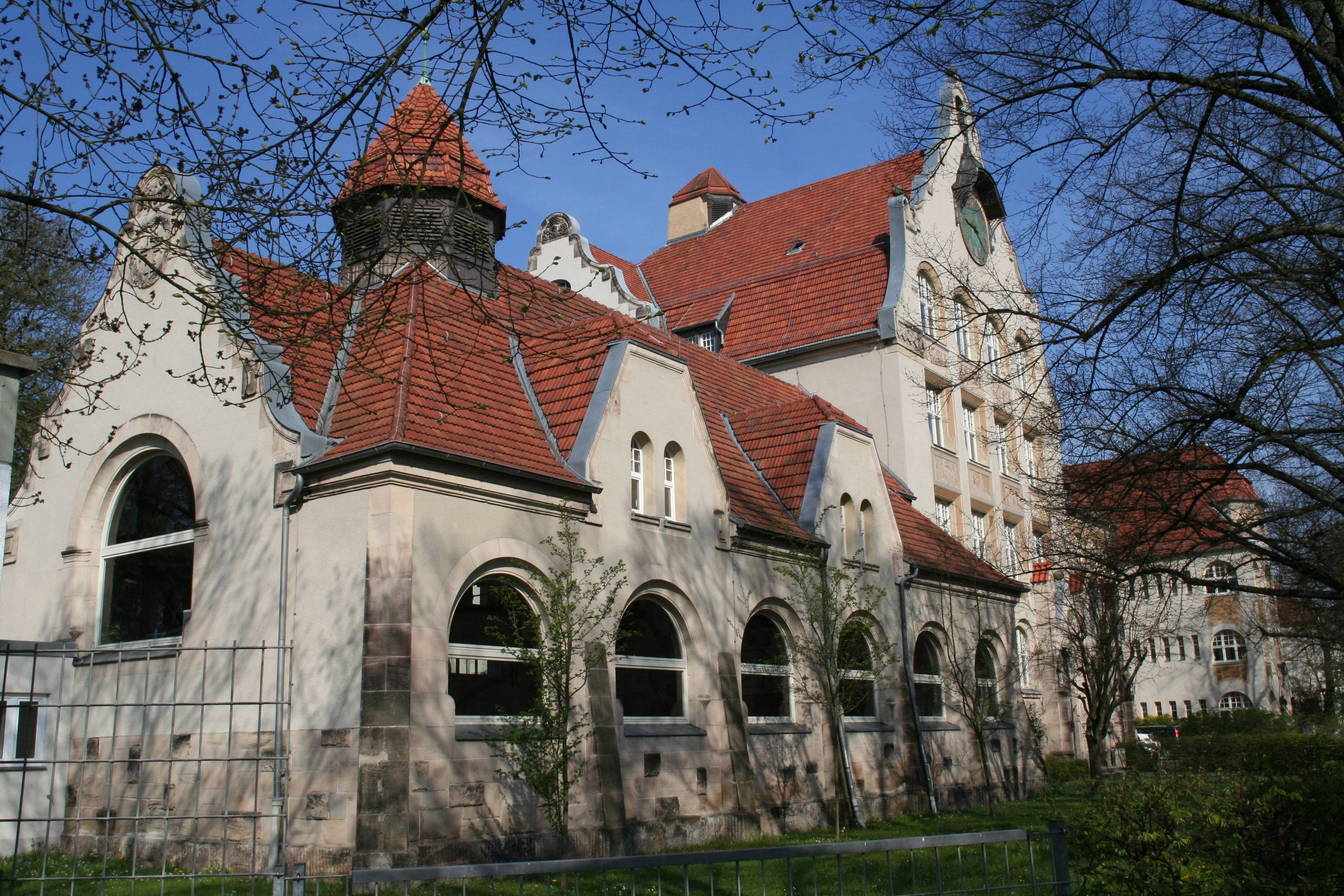 Coburg, Schleifanger 1, Heiligkreuz-Volksschule, Turnhalle